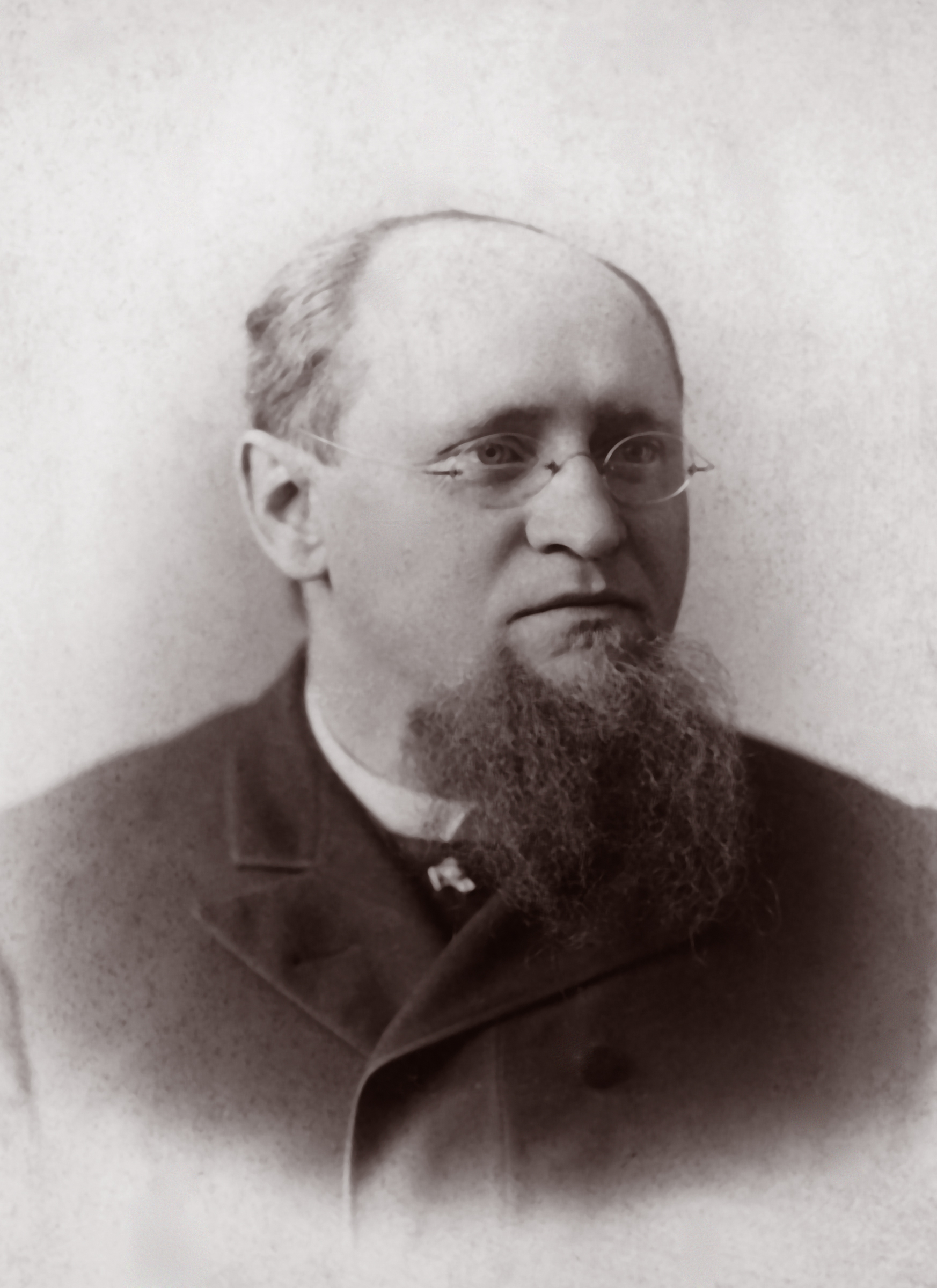 Rudolf Gottfried Arndt (31/03/1835, Bialken, Westpreussen, aujourd'hui Białki, Pologne ; 29/09/1900, Greifswald, Allemagne), psychiatre allemand.